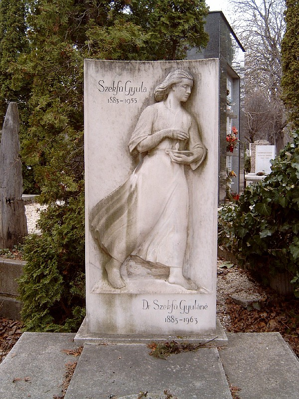 Szekfű Gyula (Székesfehérvár, 1883. máj. 23. – Bp., 1955. jún. 29.): történész, publicista, egyetemi tanár sírja Budapesten. Farkasréti temető: 20. körönd-1-31/32 [szobrász: Pátzay Pál].